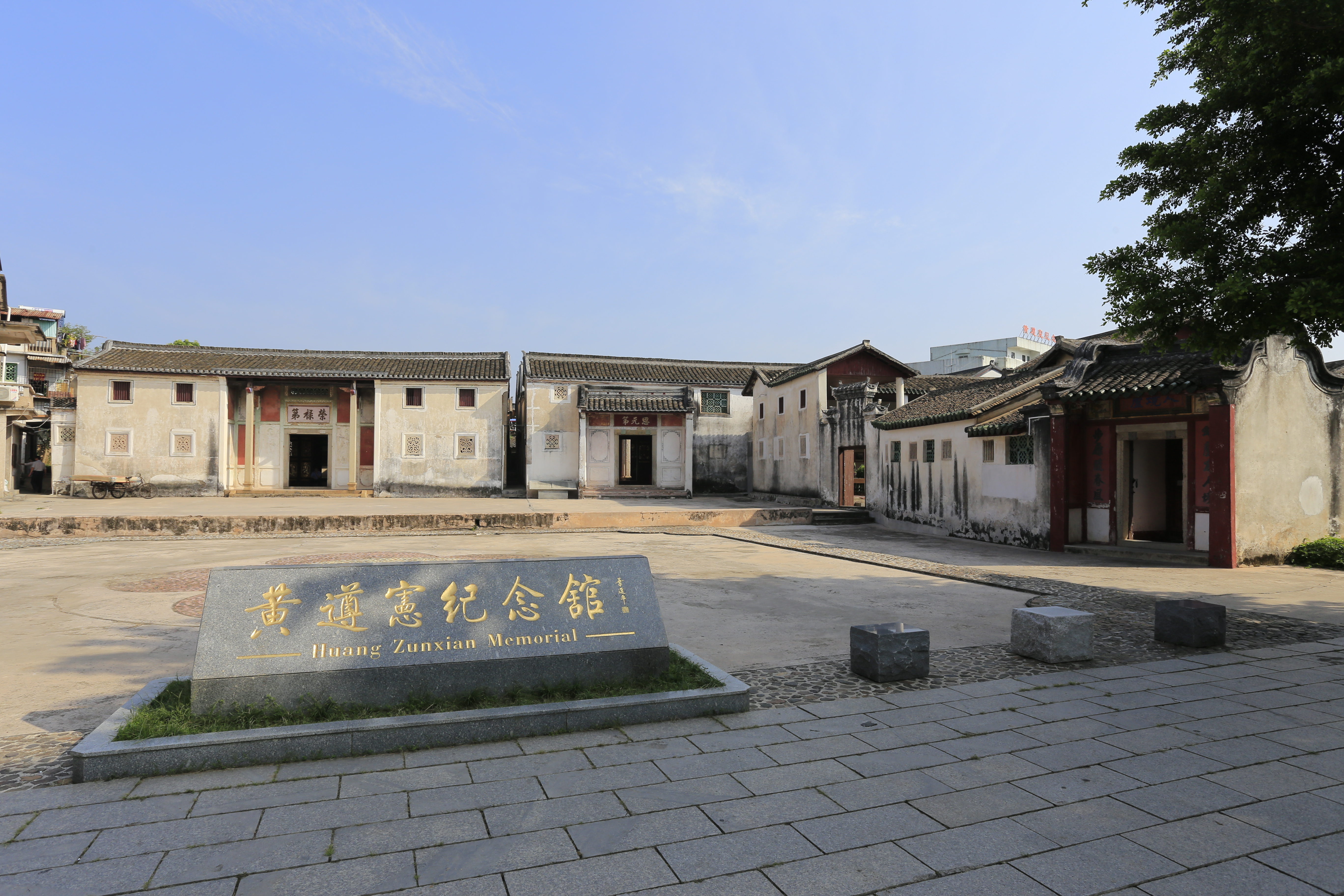 梅州市梅江区黄遵宪纪念馆（人境庐、荣禄第、恩元第）——